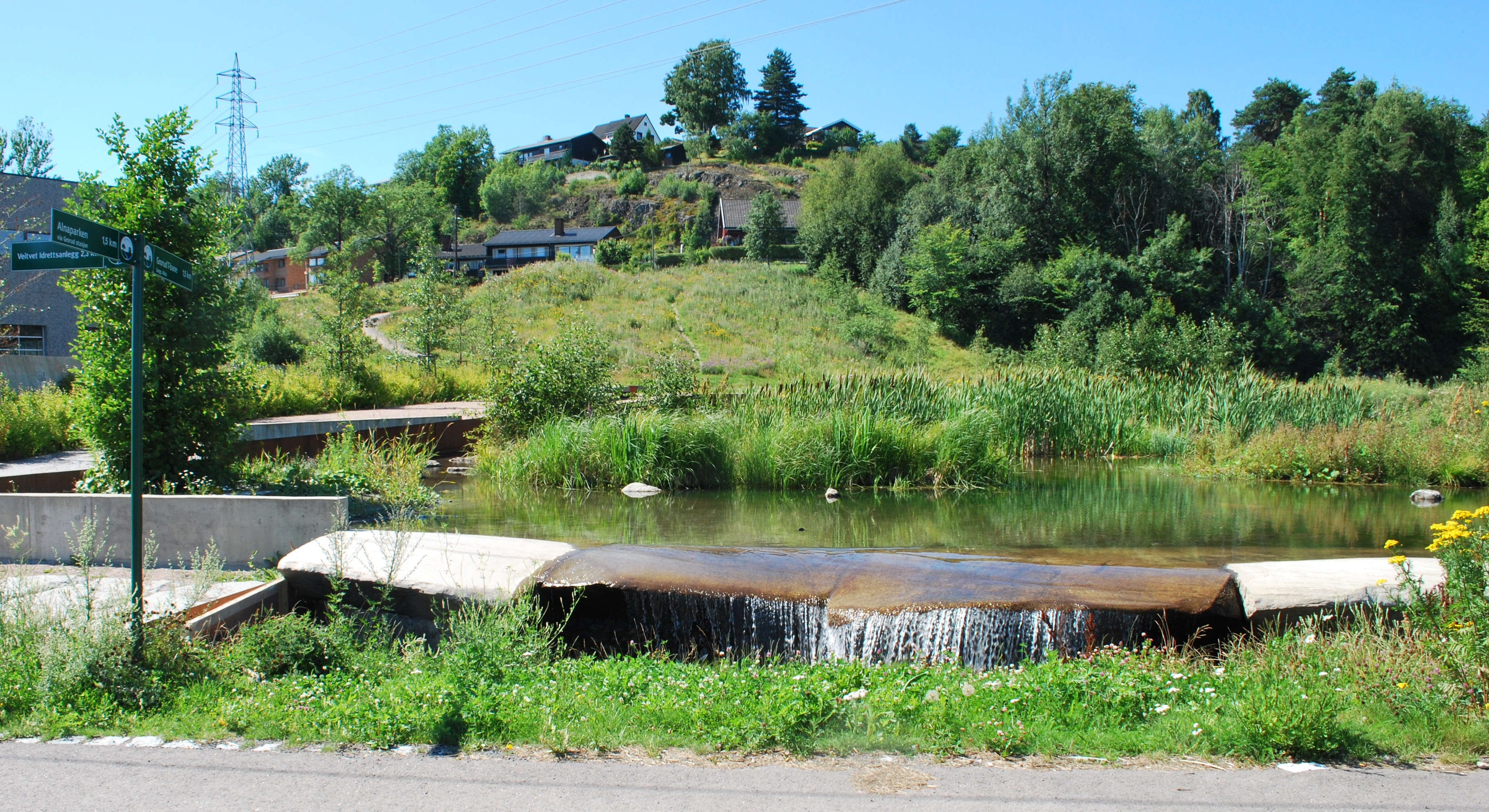 Hølaløkka waterpark, Grorud, Oslo